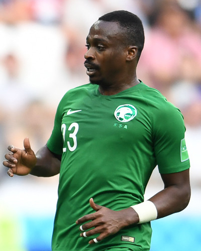 Египет с Салахом проиграл Саудовской Аравии